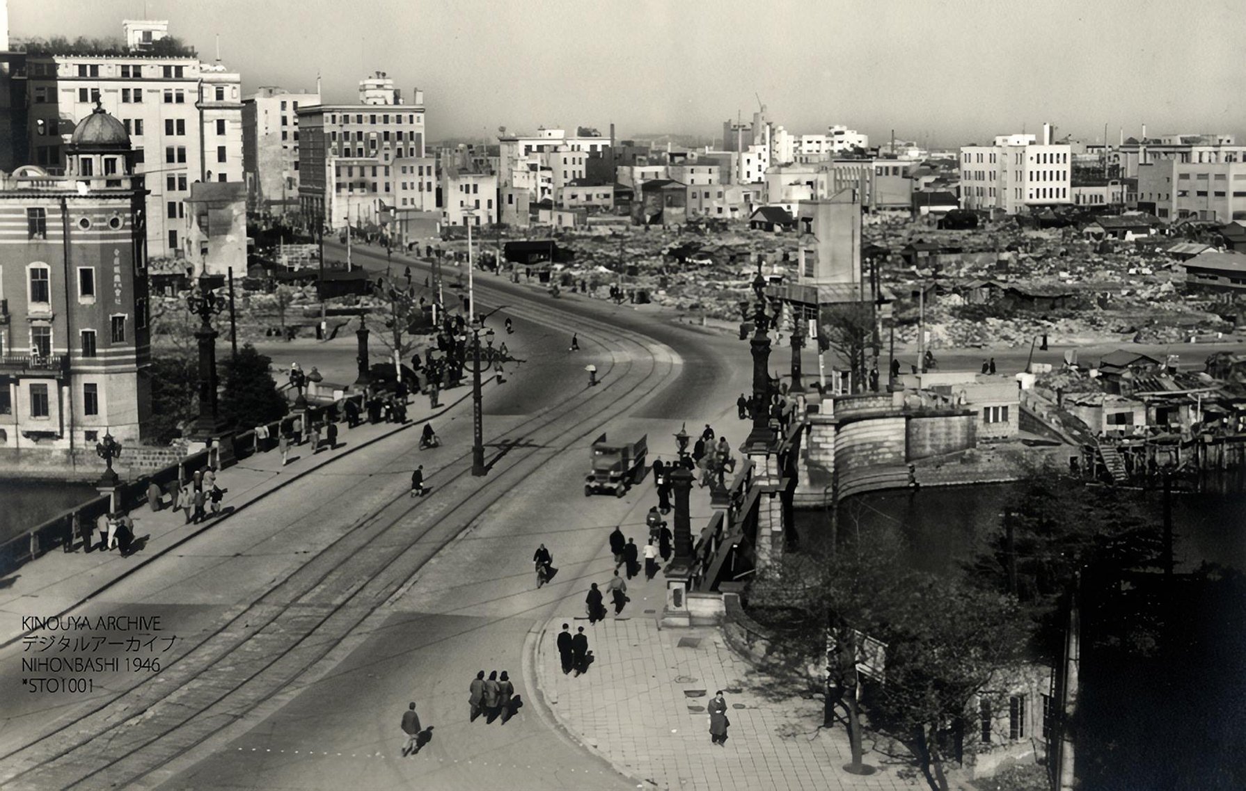 Nihonbashi, Tokyo 1946 - Allied Occupation Period 東京日本橋昭和26年